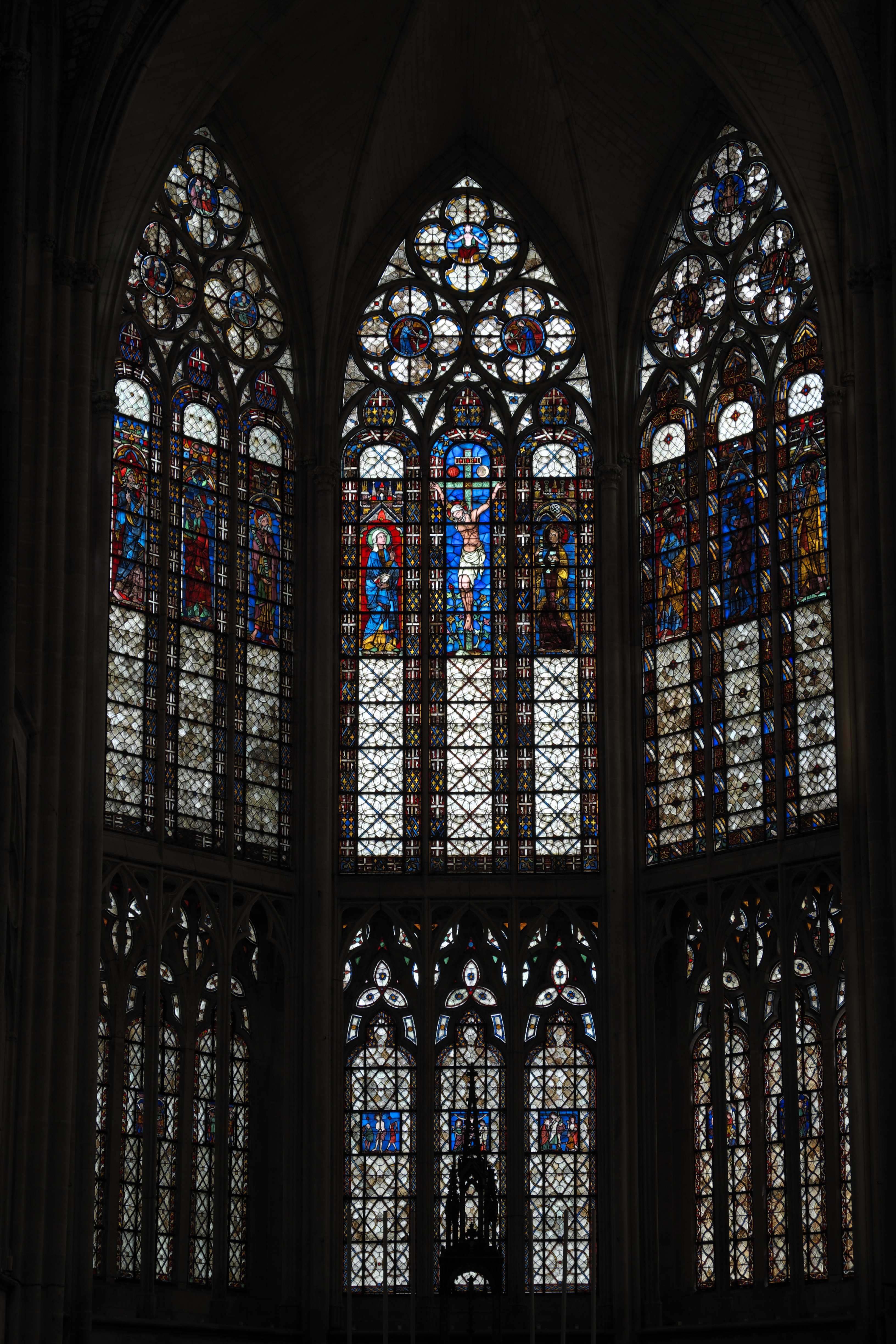 Basilika Saint-Urbain in Troyes im Département Aube (Champagne-Ardenne/Frankreich), obere Chorfenster, Bleiglasfenster aus dem späten 19. Jahrhundert, rechte Lanzette (Johannes) von 1270; Darstellung: Kreuzigung